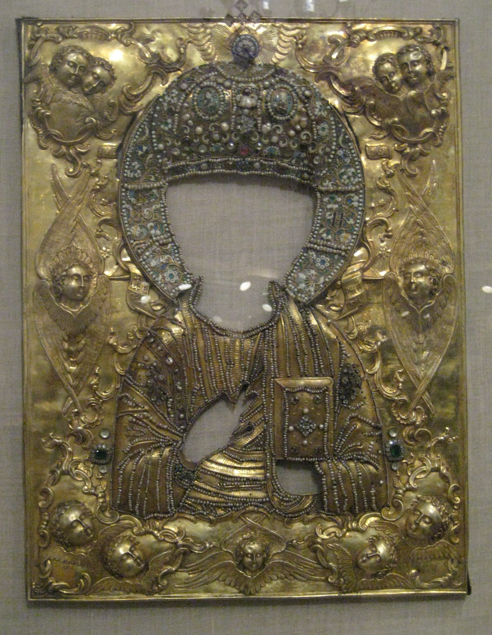 Riza of Spas Eliazarovskiy icon. Оклад иконы "Спас Елиазаровский". 17 в., Псков